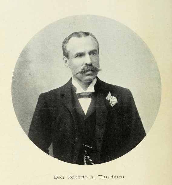 Robert Thurburn, (1830-?) banquero inglés que se desempeñó como Gerente del Banco de Londres y Río de la Plata